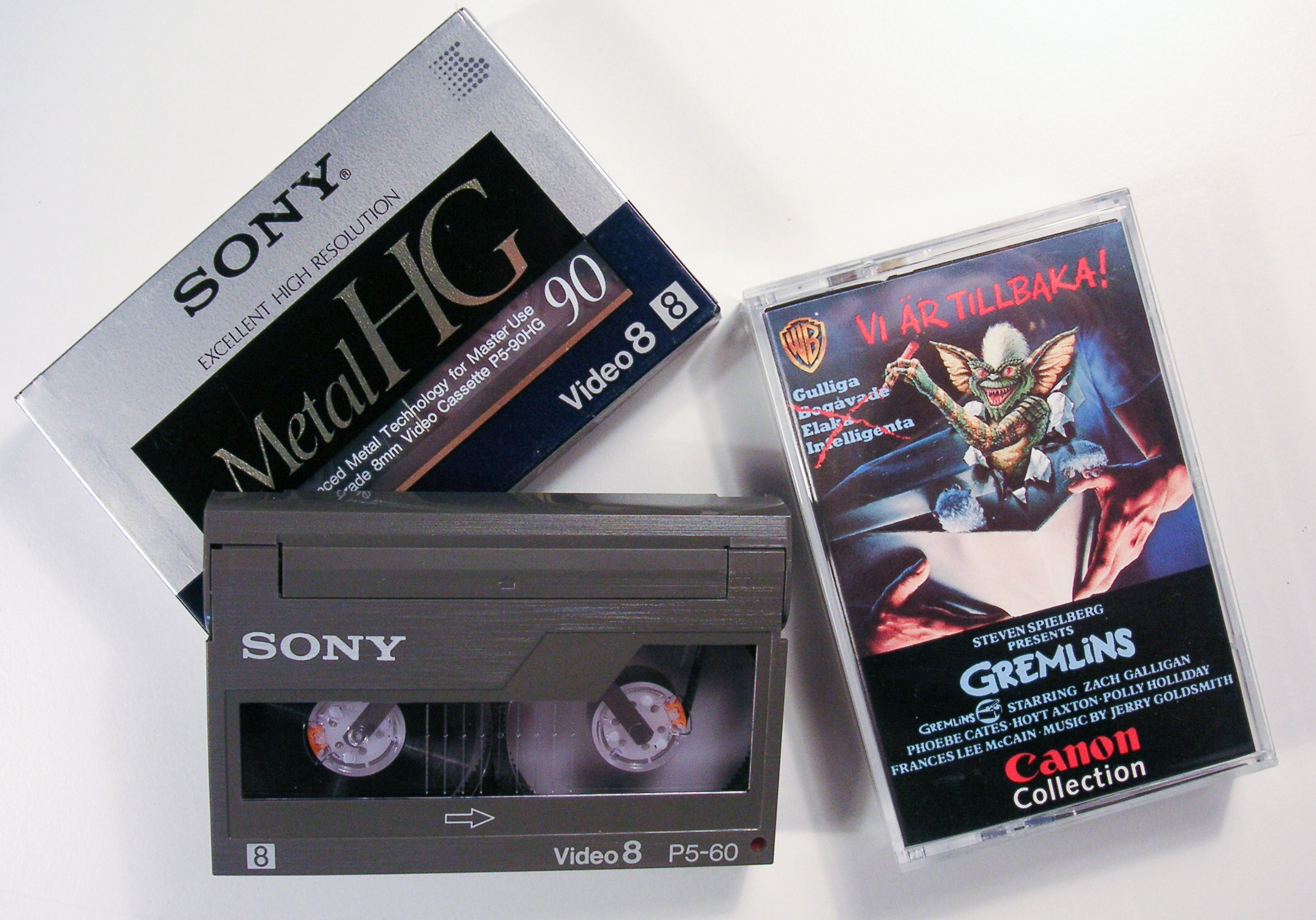 Sony Video 8-Band und Kauffilm von Canon